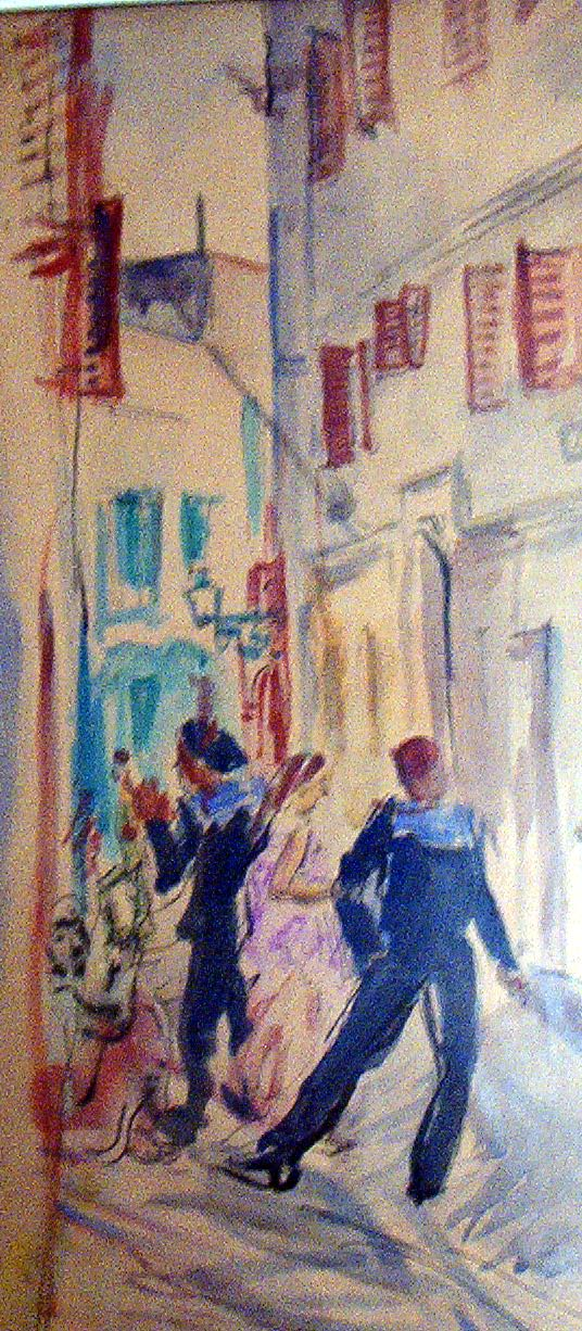 Tableau de Jean Launois